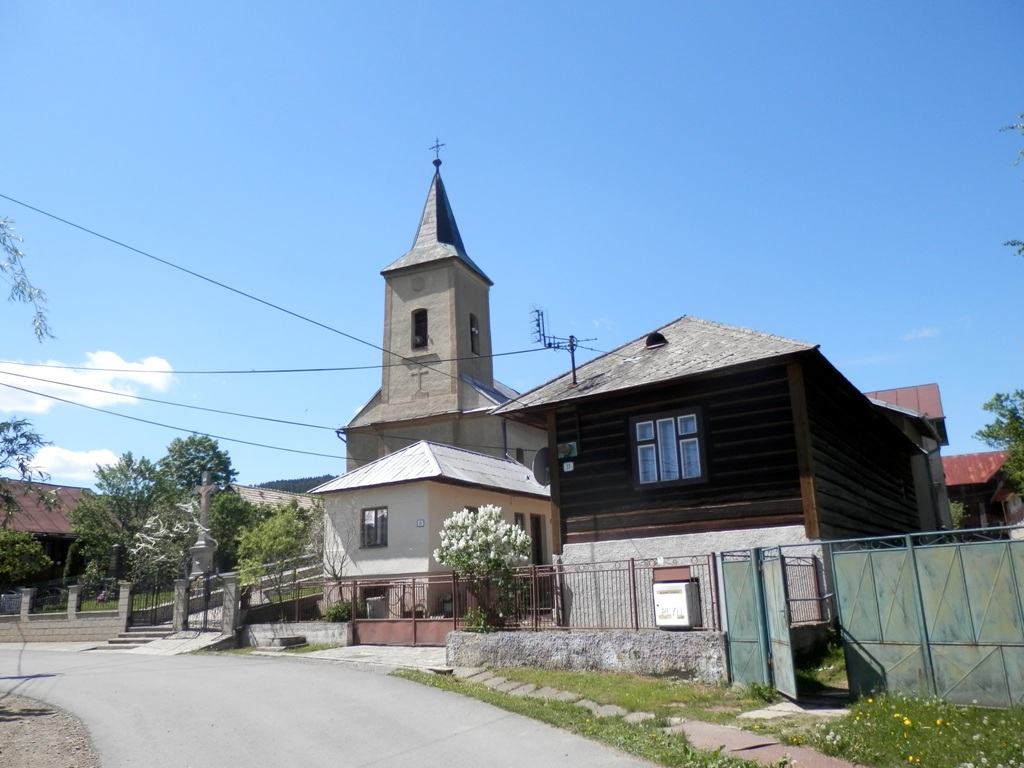 Obec Vislanka. Okres Stará Ľubovňa.